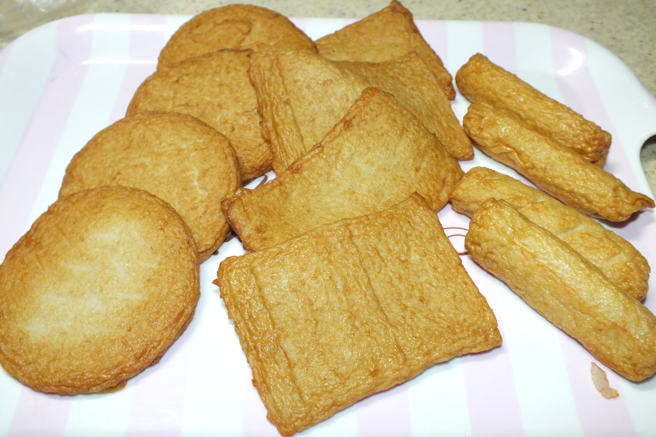 2016-02-06 Agekamaboko-揚げかまぼこ 大黒天物産 12個 100円